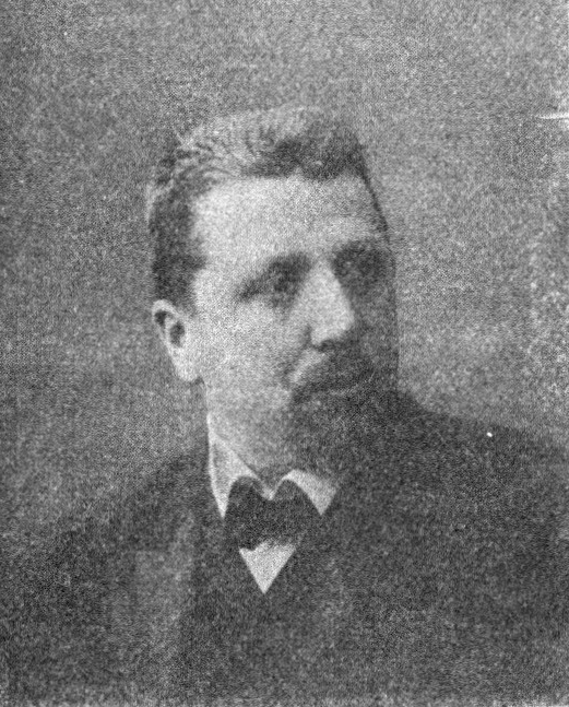 Österreichischer Politiker, Reichsratswahl 1907, Name siehe Dateiname